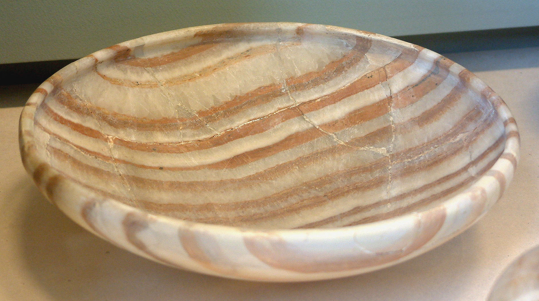 Coupe en albâtre. Origine : Abou Roach. Epoque Thinite. Albâtre. [1]